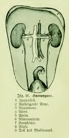 Fig. 16. Harnorgane. 1 Zwerchfell. 2 Aufsteigende Vene. 3 Nierenvene. 4 Niere. 5 Aorta. 6 Nierenarterie. 7 Harnleiter. 8 Blase. 9 Teil des Mastdarms.